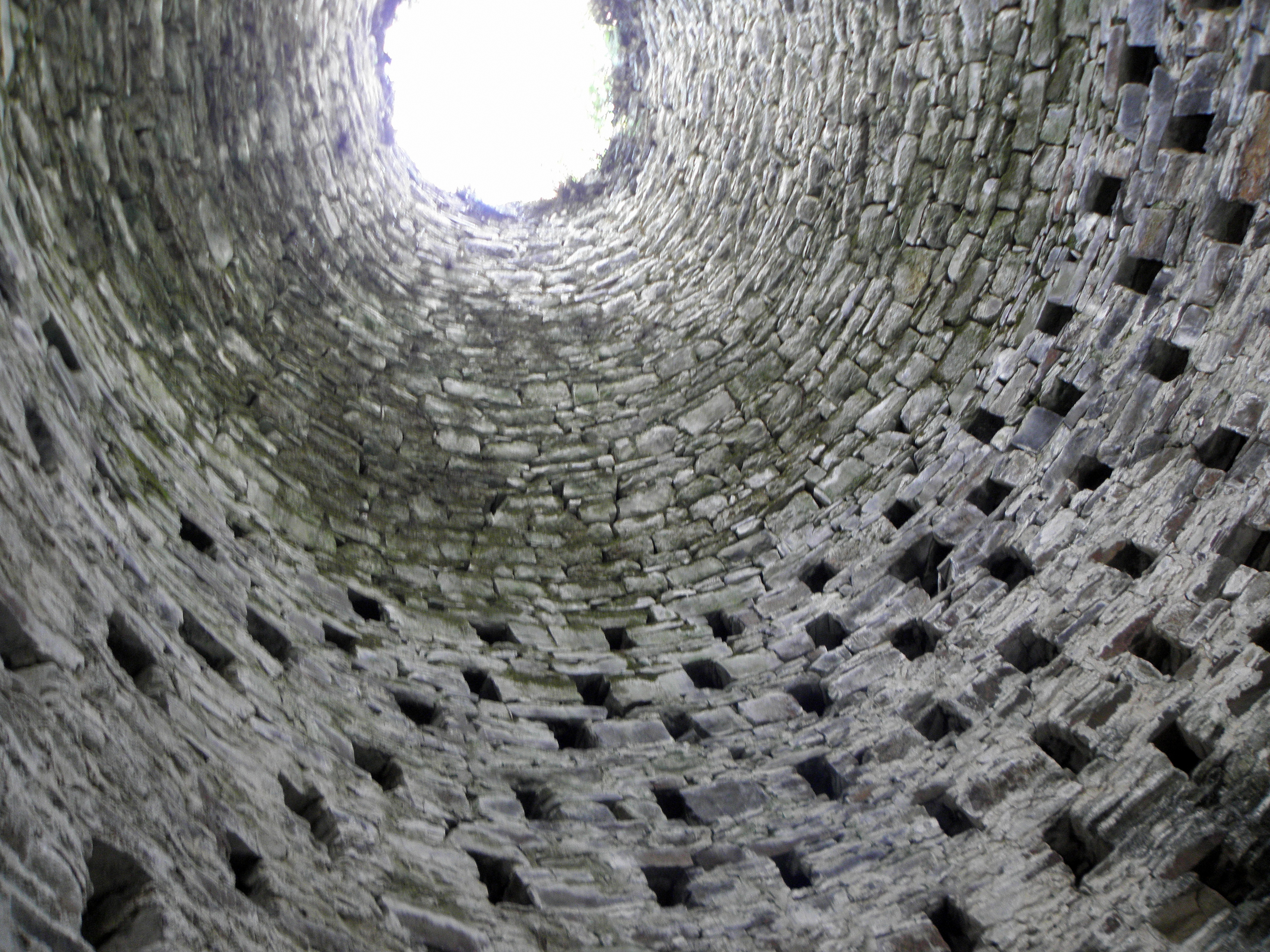 Colombier de Lillemer (35).